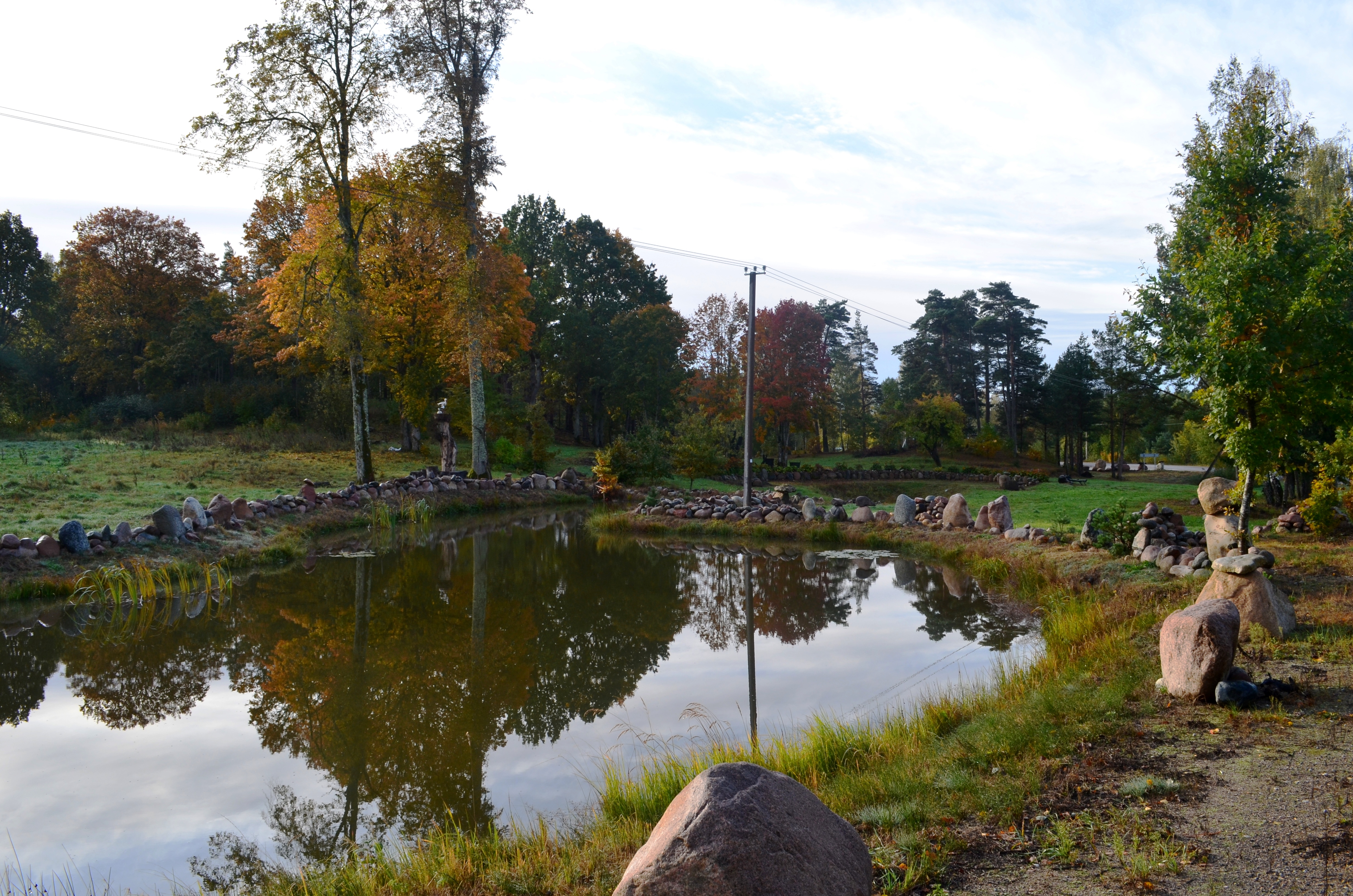 Tvenkinėlis Vigantiškiuose, Telšių raj.